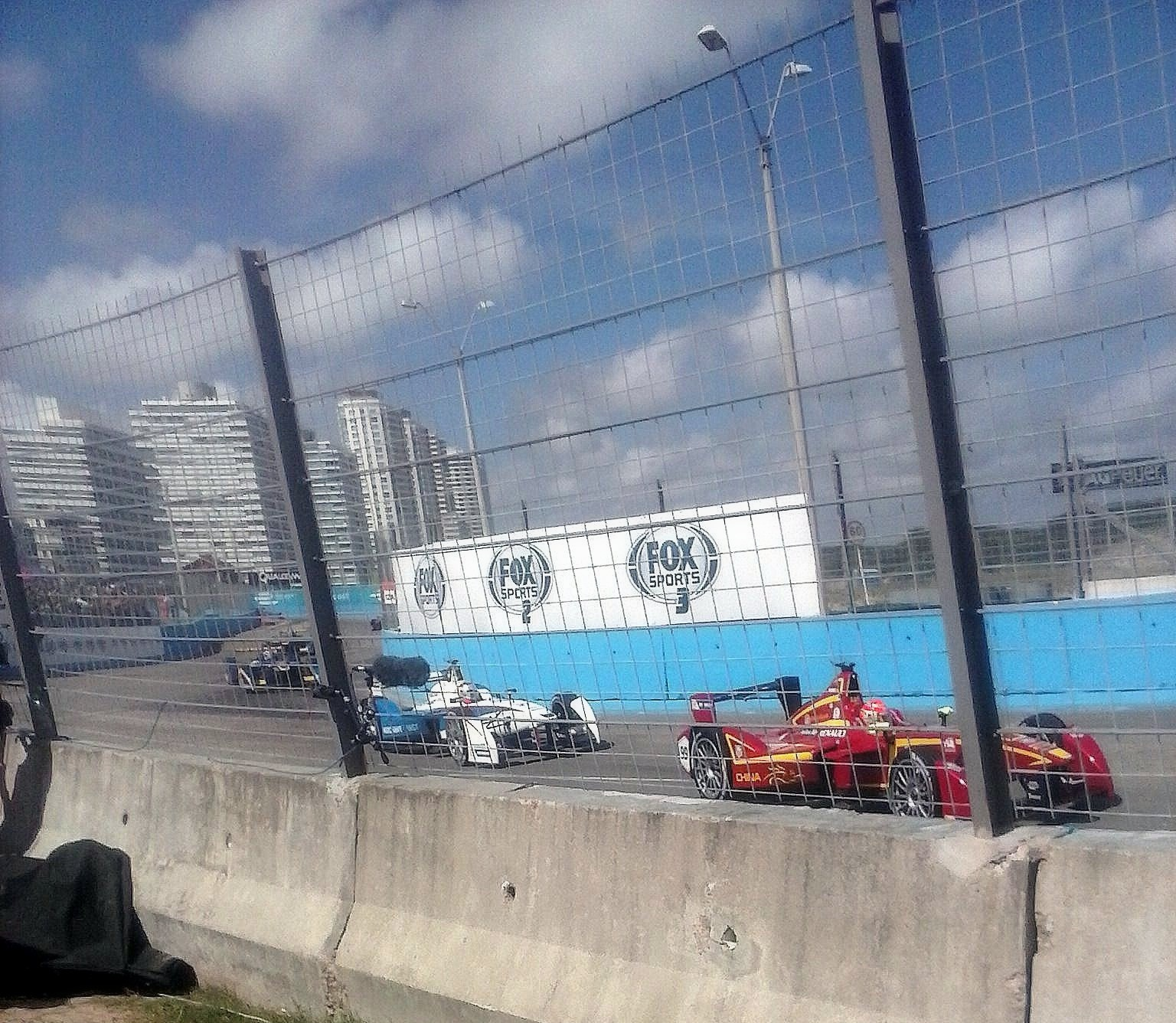 Nelson Piquet Jr. liderando la carrera del ePrix de Punta del Este del 2014, fecha valida por la Formula E por delante de Jean-Eric Vergne